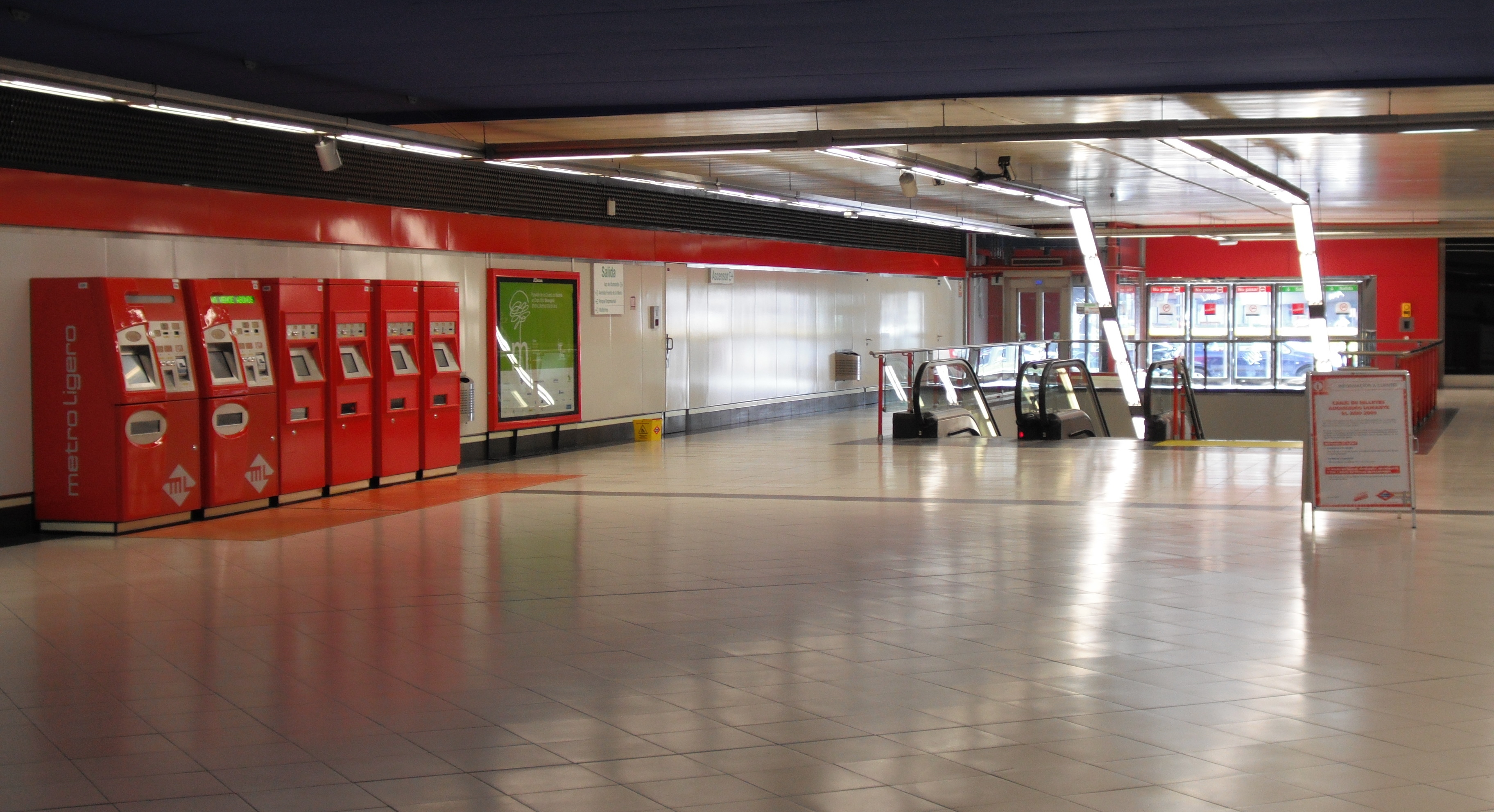 Metro ligero. Estación Fuente de la Mora Madrid Comunidad de Madrid España